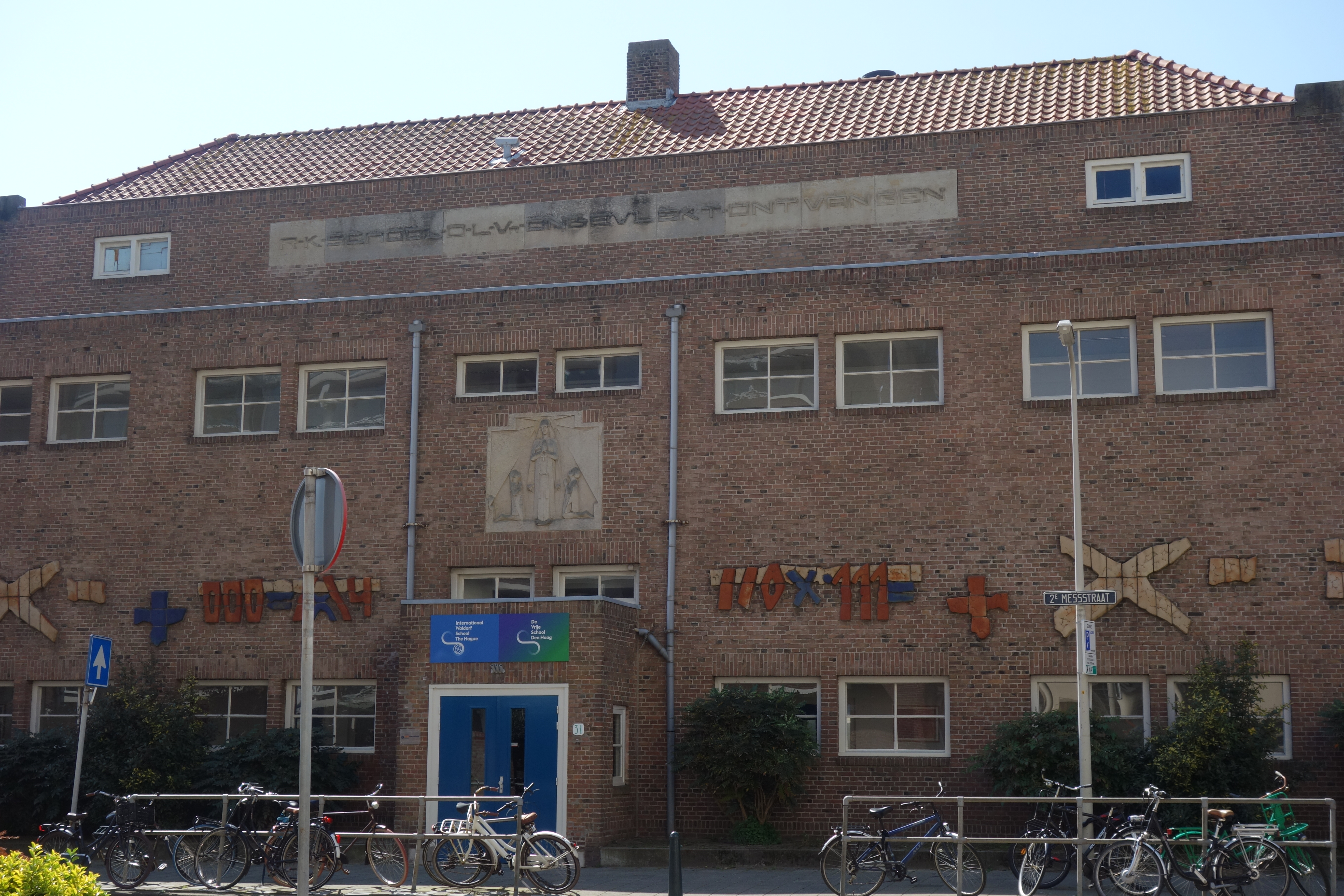 Vrije School Den Haag, 2e Messstraat 31, Scheveningen, 2019